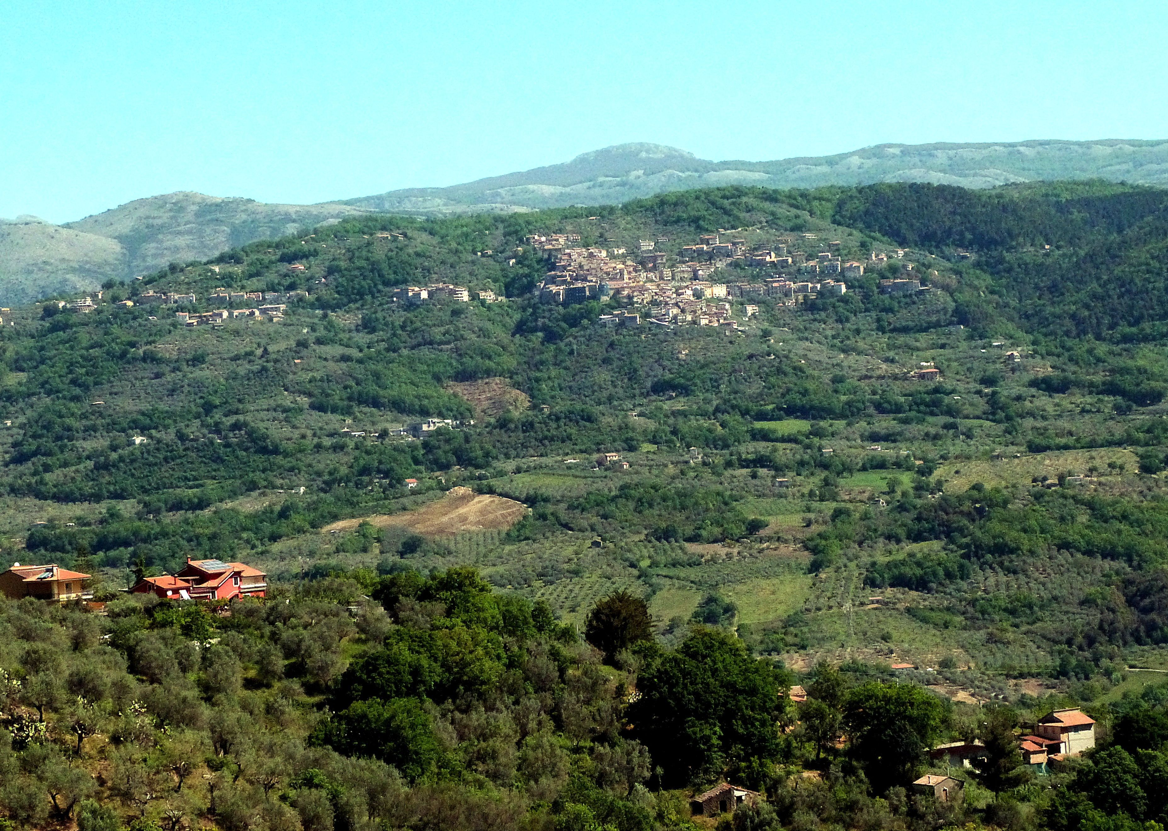 Ansicht von Aquara